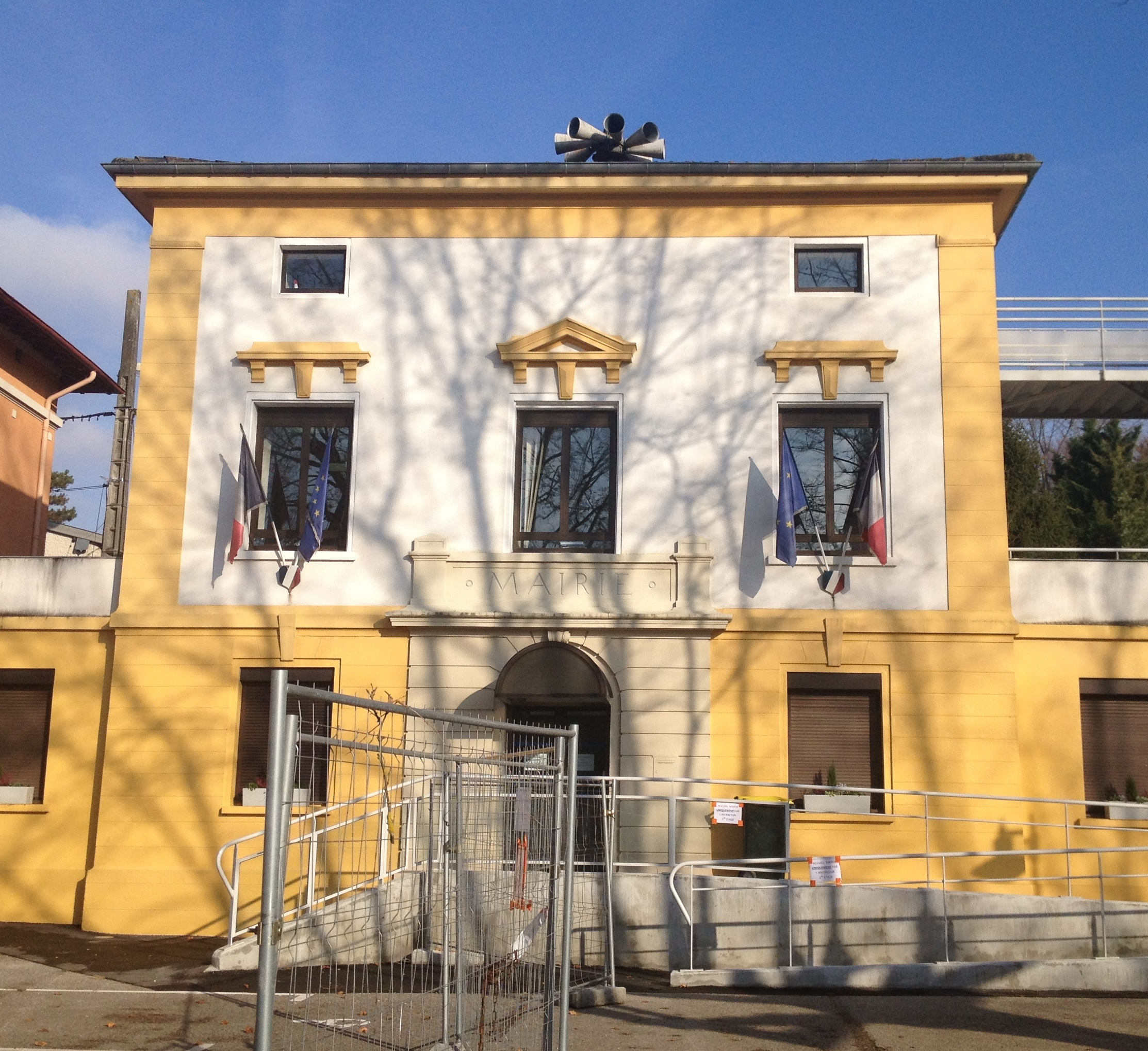 Cailloux-sur-Fontaines.